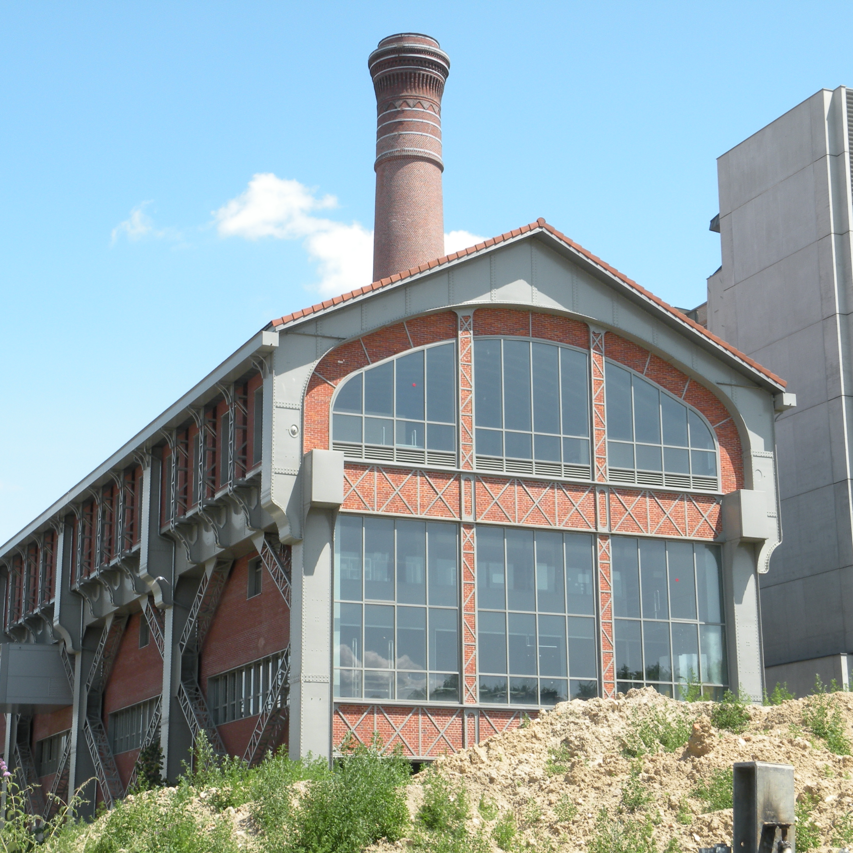 Ancienne usine d’air comprimé de la rue Jean-Antoine-de-Baïf près du quai Panhard-et-Levassor dans le 13e arrondissement de Paris, aujourd’hui intégrée à l’école nationale supérieure d'architecture de Paris-Val de Seine.